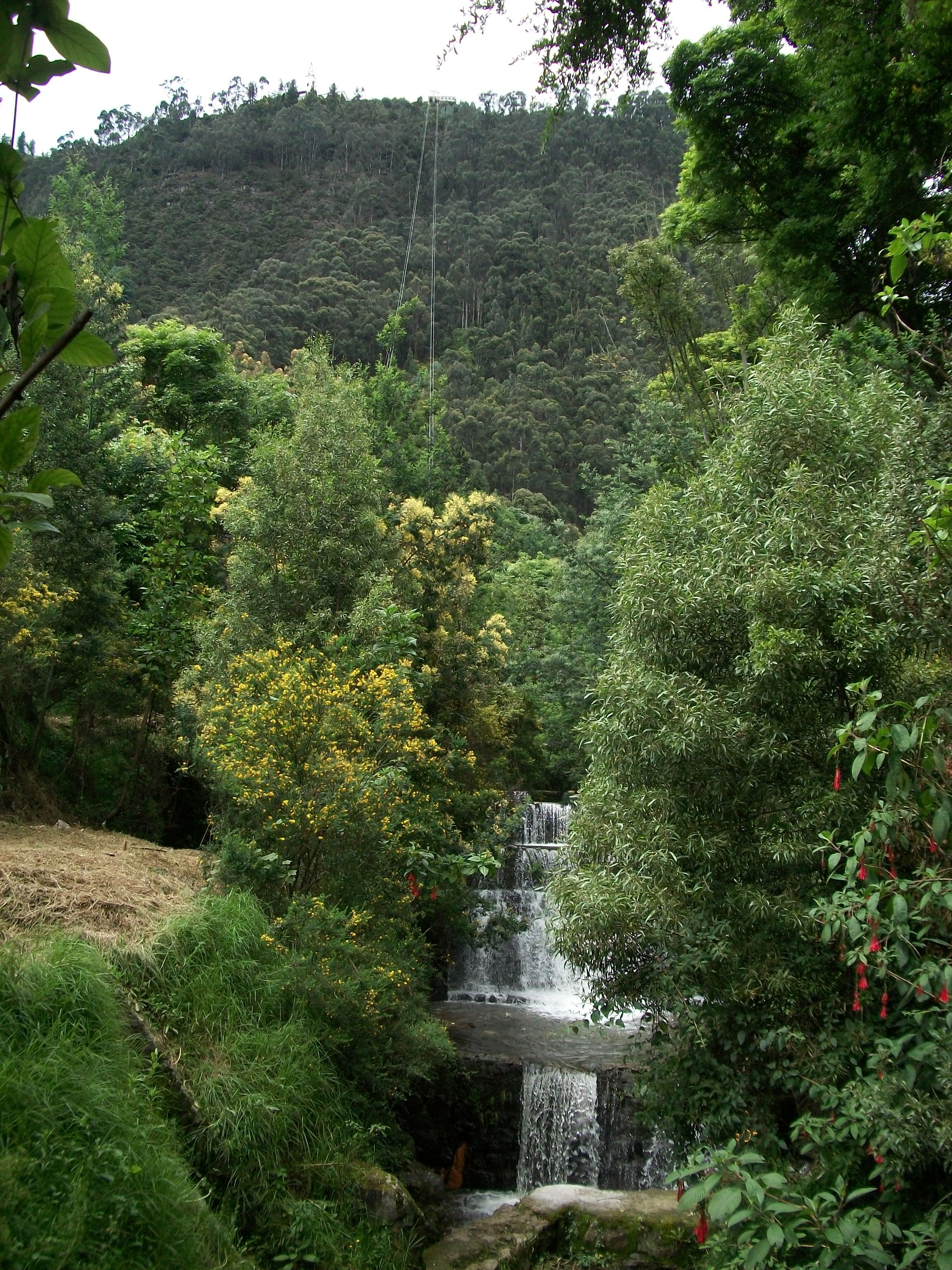 Río San Francisco en bogotá, cerca de la Quinta de bolívar.